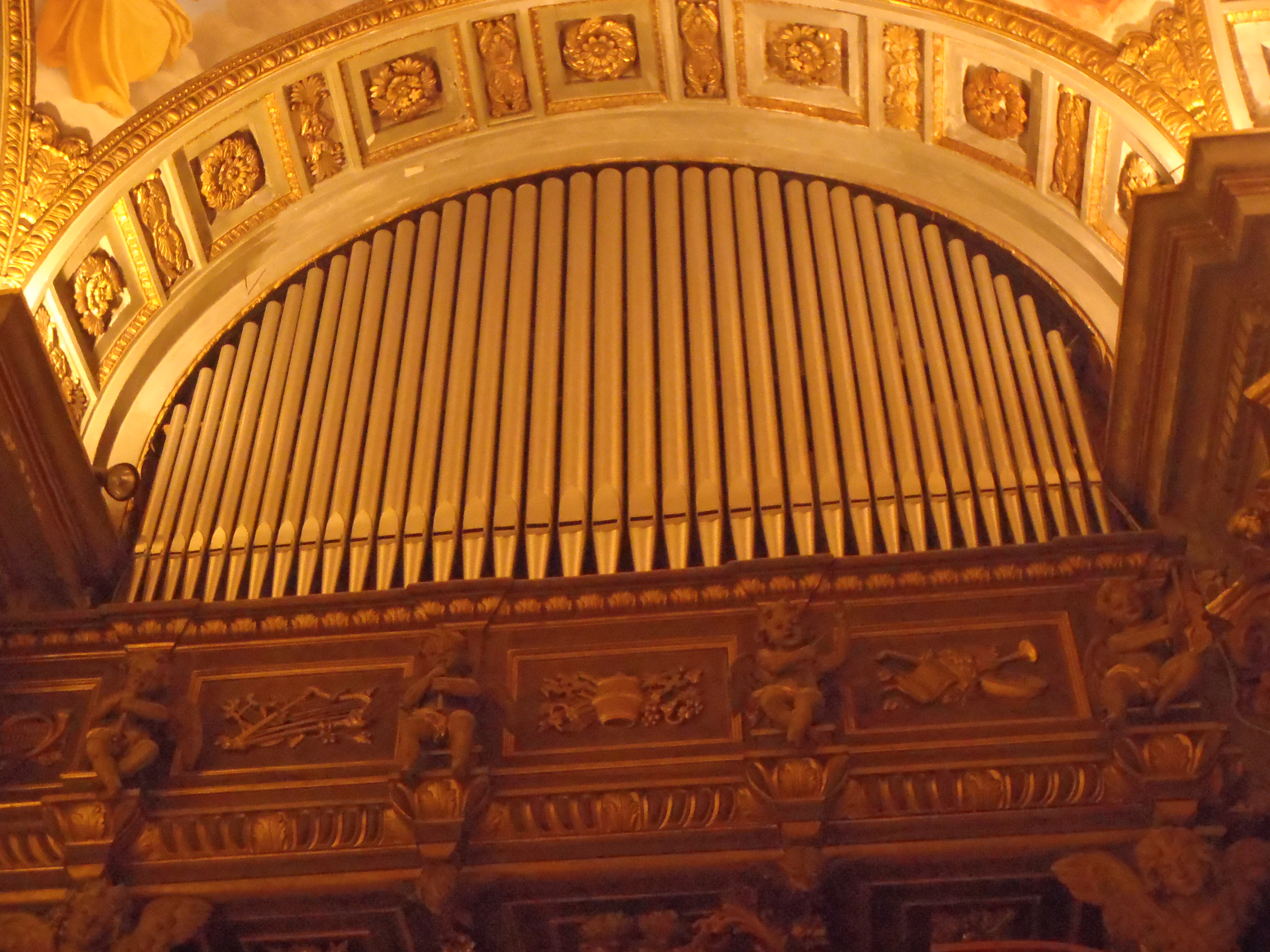 Il fagotto 16', la tromba 8' e la chiarina 4' la "catenaria" delle ance del pedale si trova dietro le canne mute, basilica di Santa Margherita Ligure, Liguria, Italia